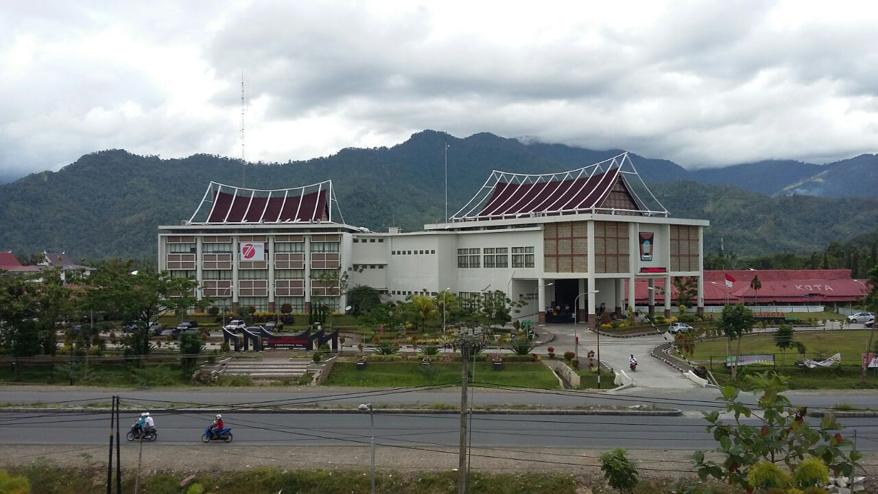 Balai Kota padang baru